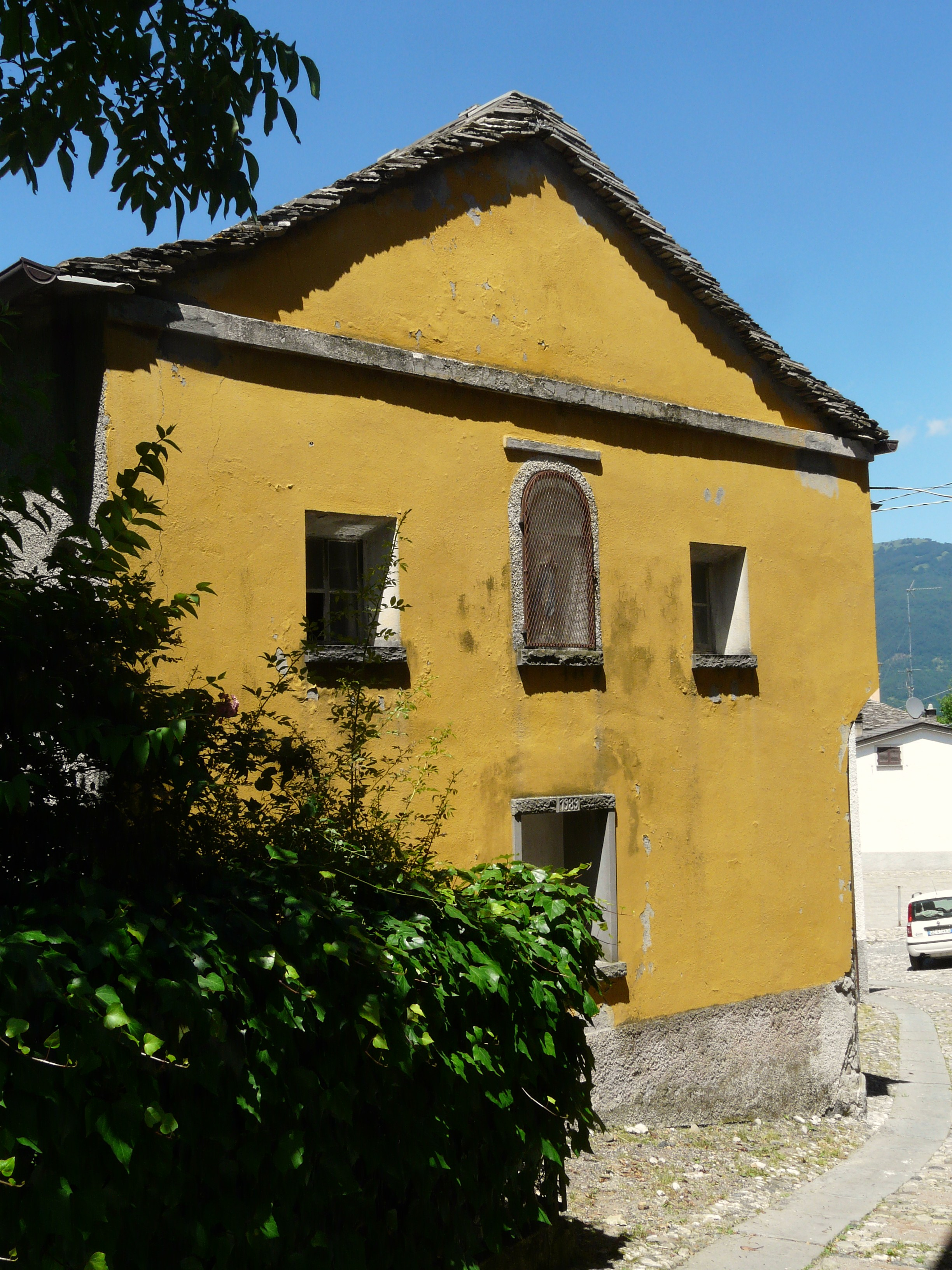 Chiesa di San Rocco, Tornolo, Emilia Romagna, Italia